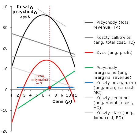 Schemat obrazujący cenę optymalną w relacji do przychodów, kosztów i zysku.